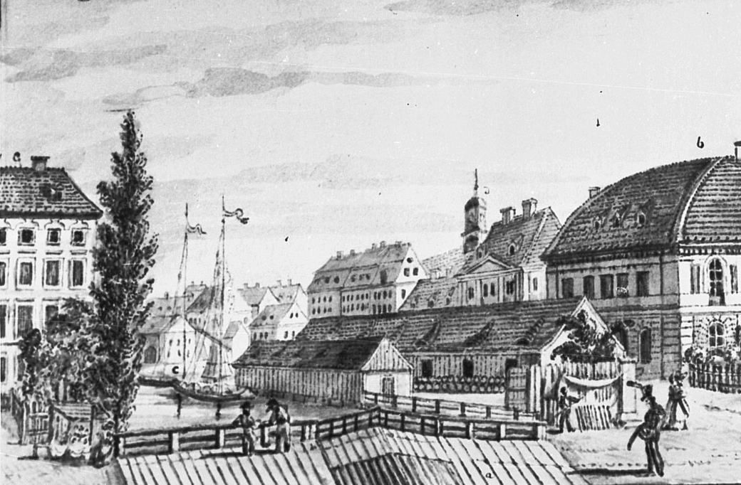 Ansicht der Hundebrücke und des Alten Packhofs in Berlin 1810.